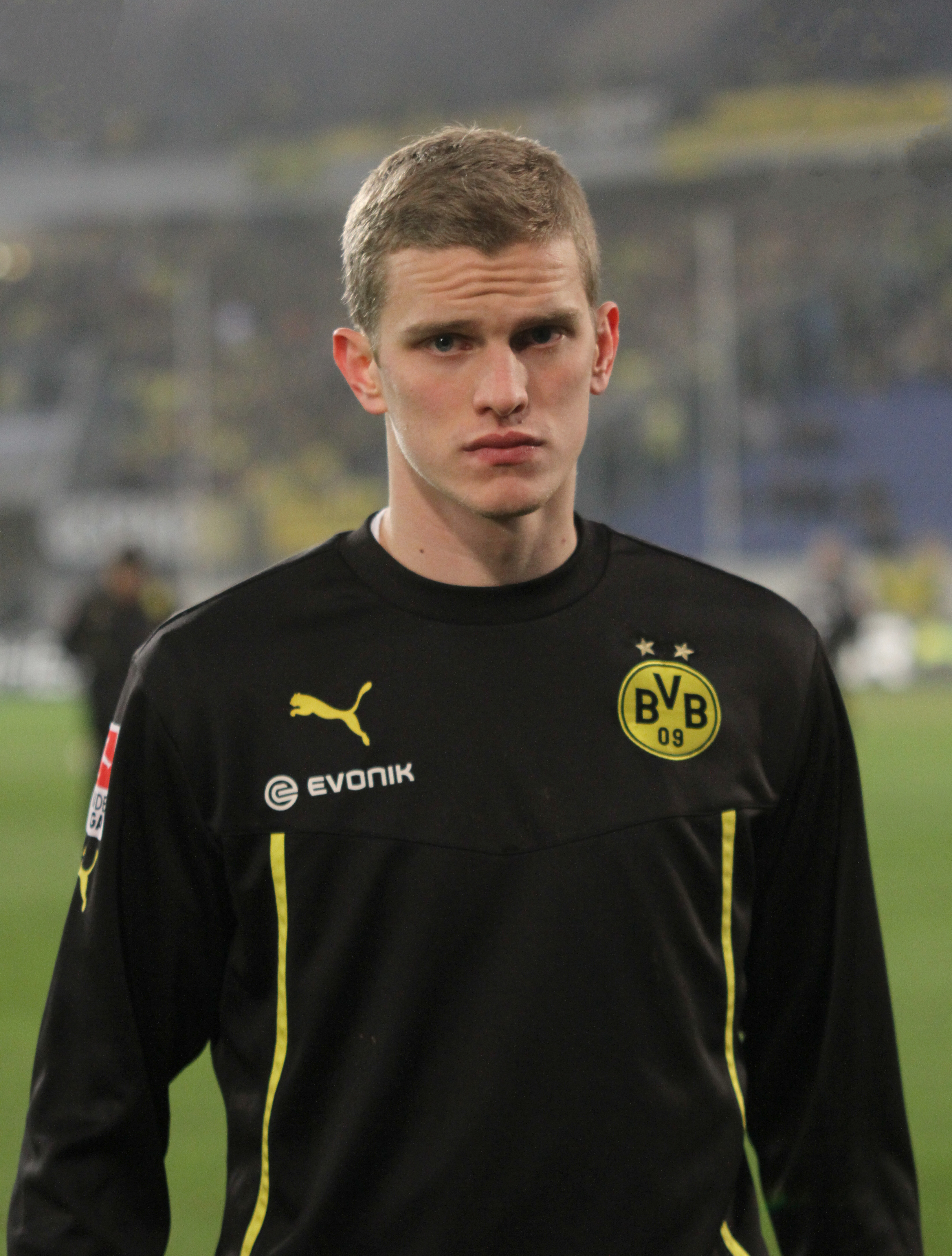 Sven Bender (Borussia Dortmund) beim Testspiel MSV Duisburg gegen Borussia Dortmund